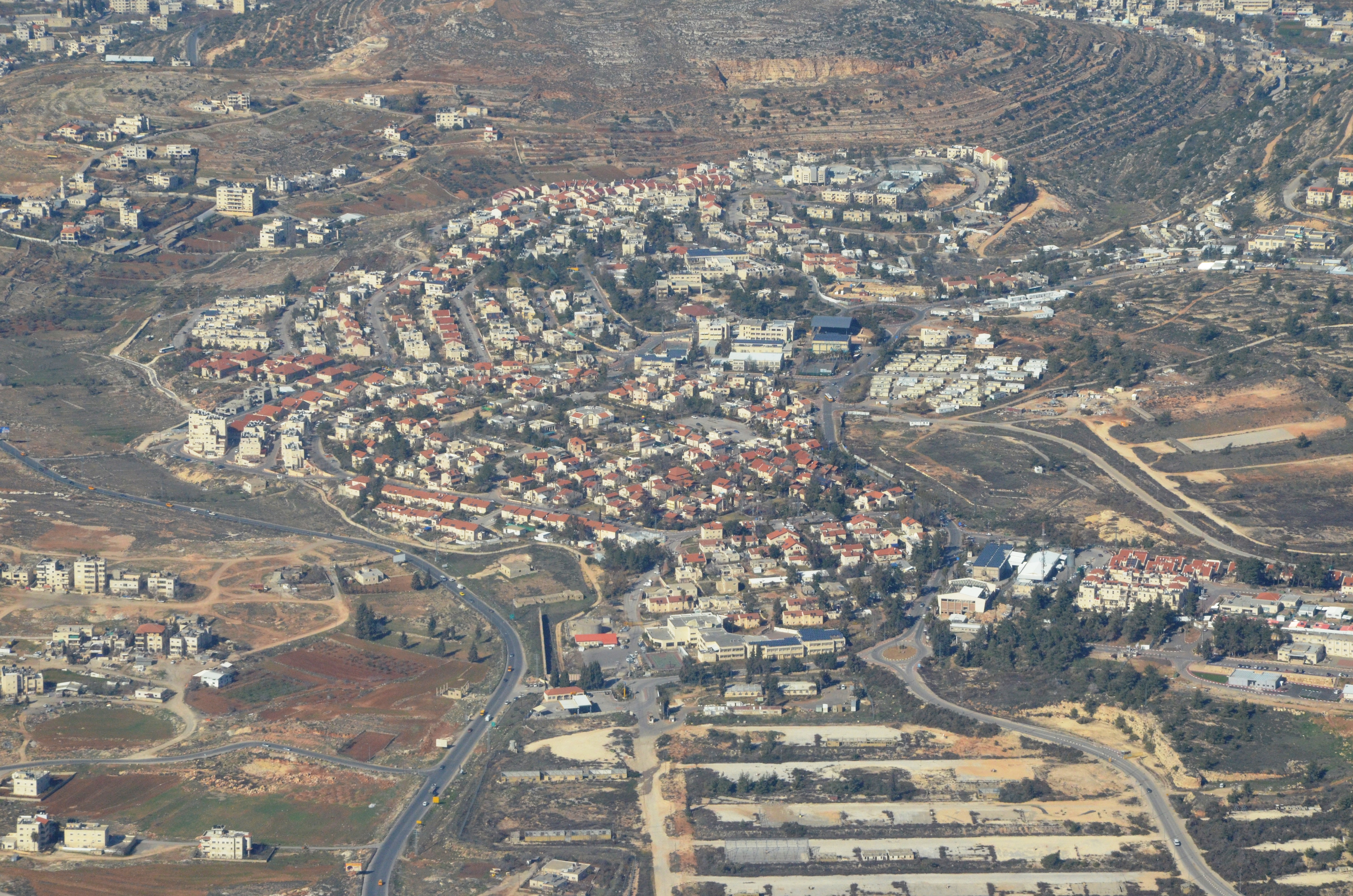 בית אל